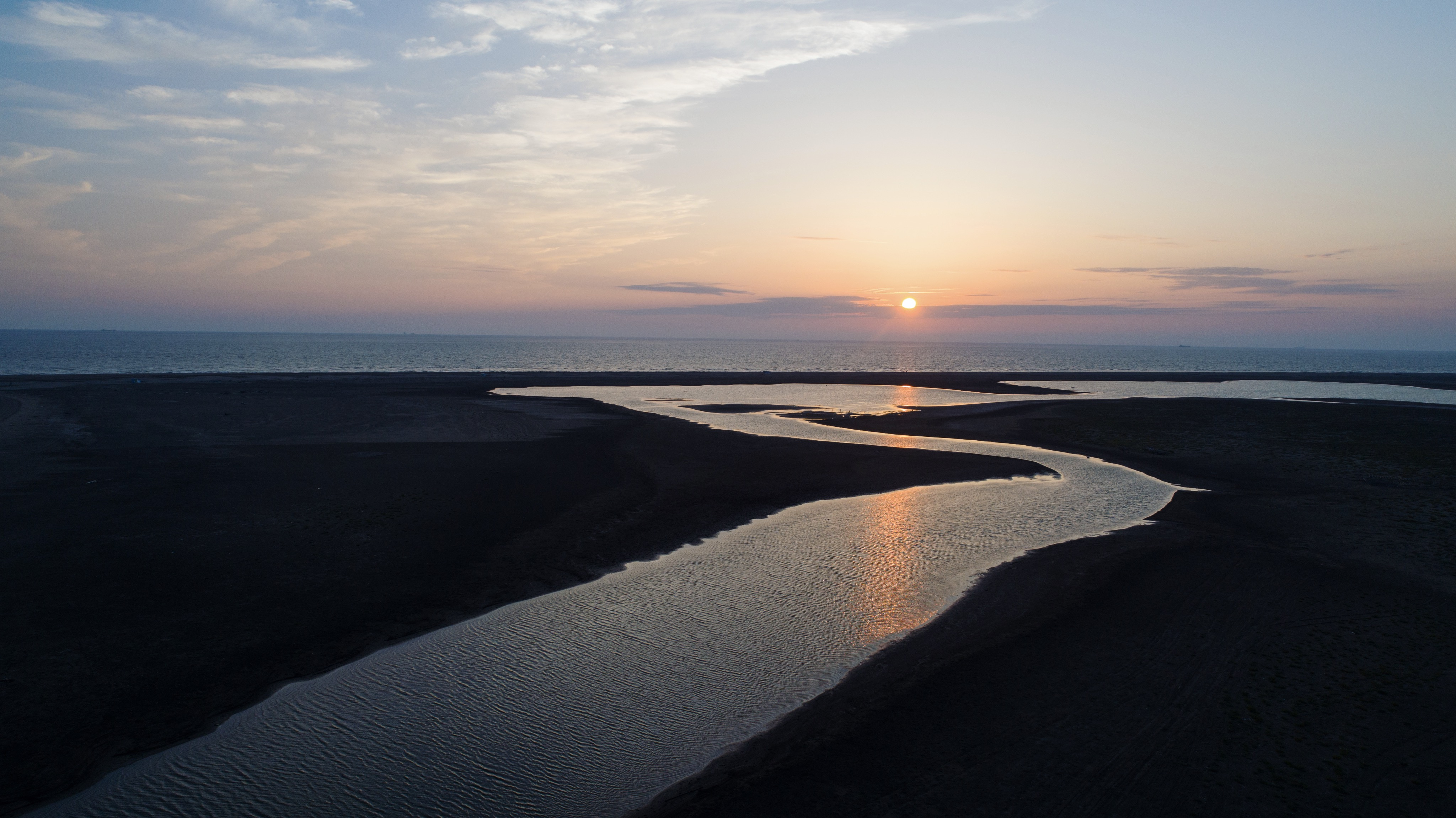 七股區新浮崙汕附近